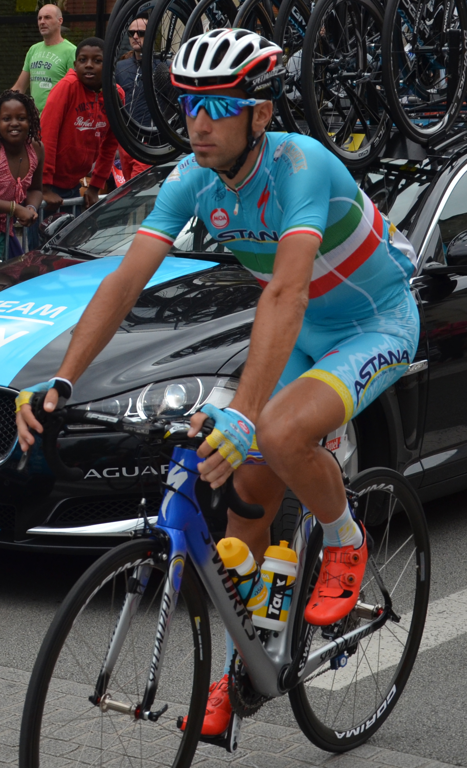 Vincenzo Nibali au départ de la 8ème étape du Tour de France 2015, à Rennes.